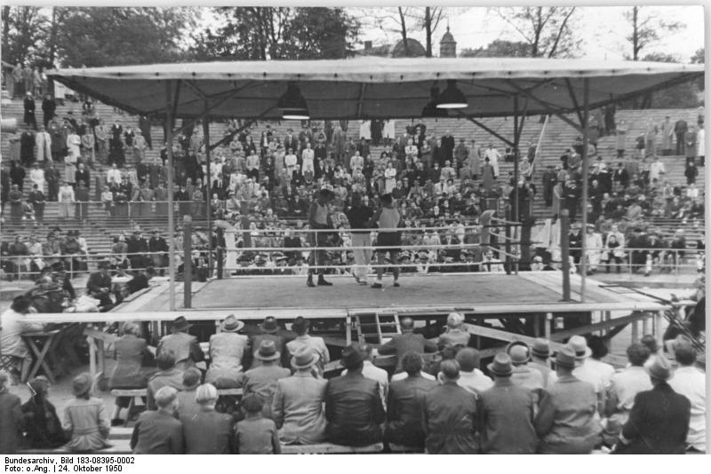 Essen, Boxkampf Illus Aze 24.10.50 Freundliche Sport-Beziehungen mit Westdeutschland.Trotz aller Schikanen der Westalliierten und ihrer "Bonner Regierung" halten die Sportler von Ost und West freundschaftliche Beziehungen aufrecht. Am 8.10.50 weilte eine aus Ringern von "Zella-Mehlis" und "Vorwärts" Greiz und den Boxern von "BSG Bergstadt" Freiberg (Mannschaftsmeister von Sachsen) zusammengesetzte Mannschaft in Essen. Sie kämpfte gegen die Ringer-Kreisauswahl von Essen-Mülheim und den Essener Boxclub Dubois 20. UBz: Die Stätte des Sporttreffens. Die Arena des Essener Boxclubs Dubois 20, während eines Boxkampfes.